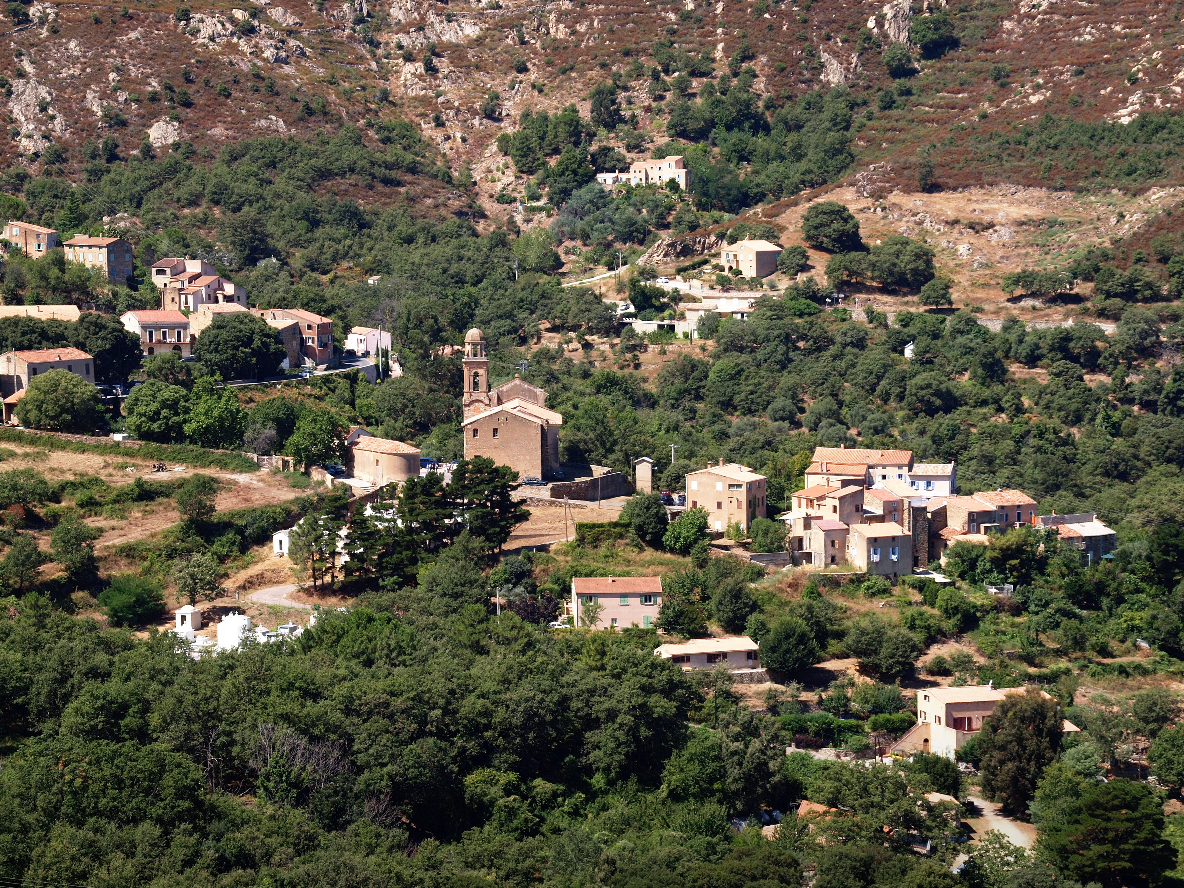 Feliceto (Corsica) - Strambolaccie et l'église Saint-Nicolas